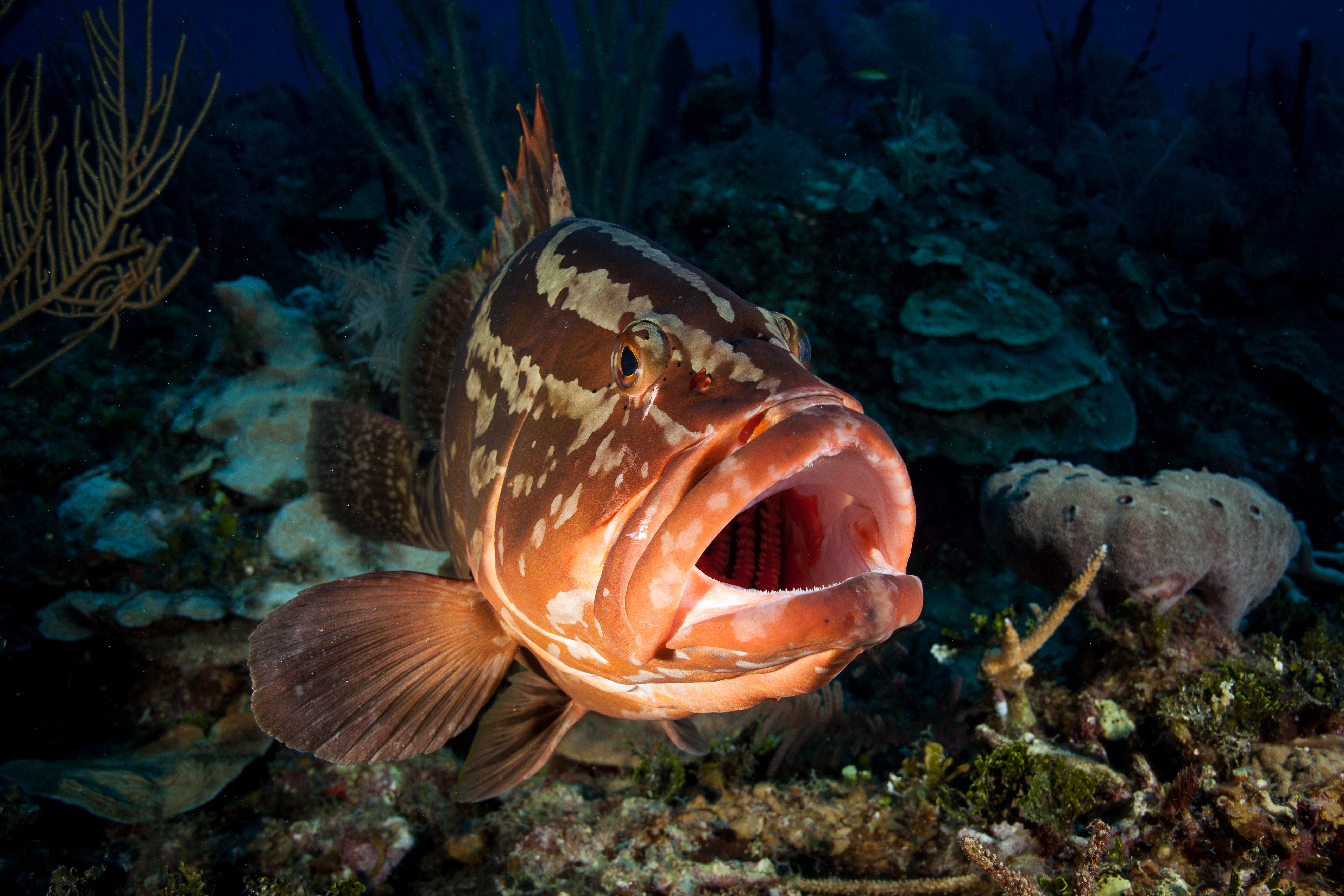 2017, cuba, jardines aggressor, los indios, nassau grouper maw